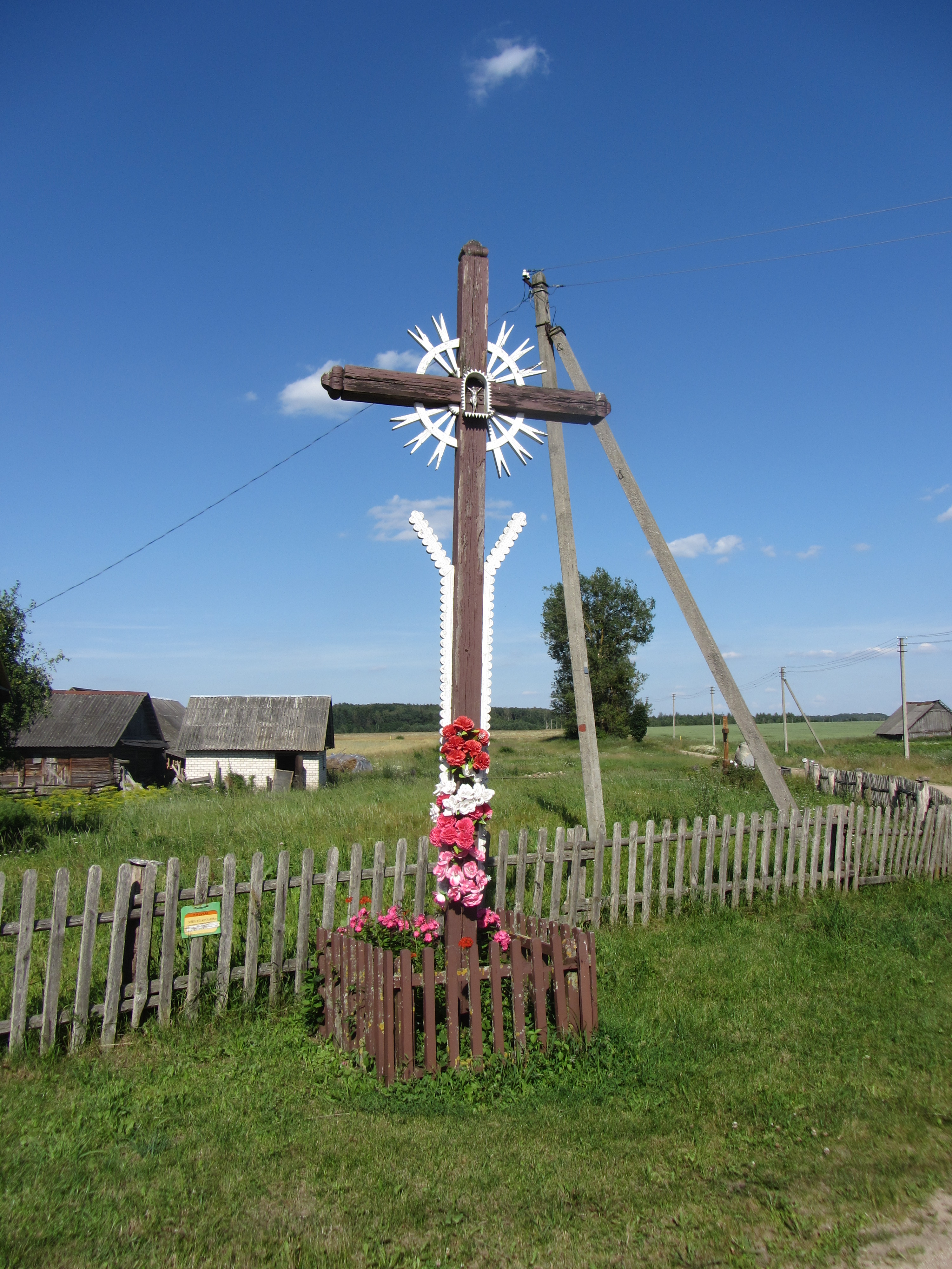 Kalviai 65264, Lithuania